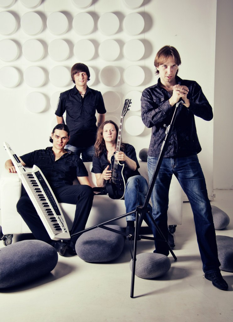 Фото с официальной страницы группы «В Контакте». Там указано разрешение на использование этой фотографии с этой лицензией + с разрешения самой группы